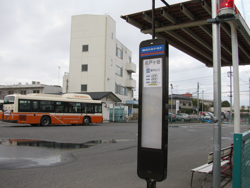 名戸ヶ谷バス停